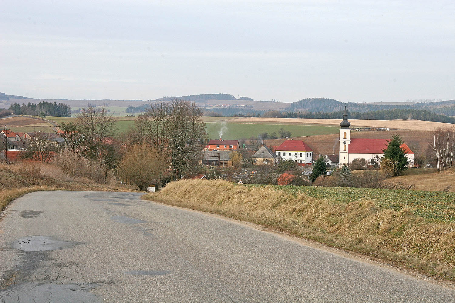 Radošovice - pohled na kostel svatého Víta se silnice do Vlašimi